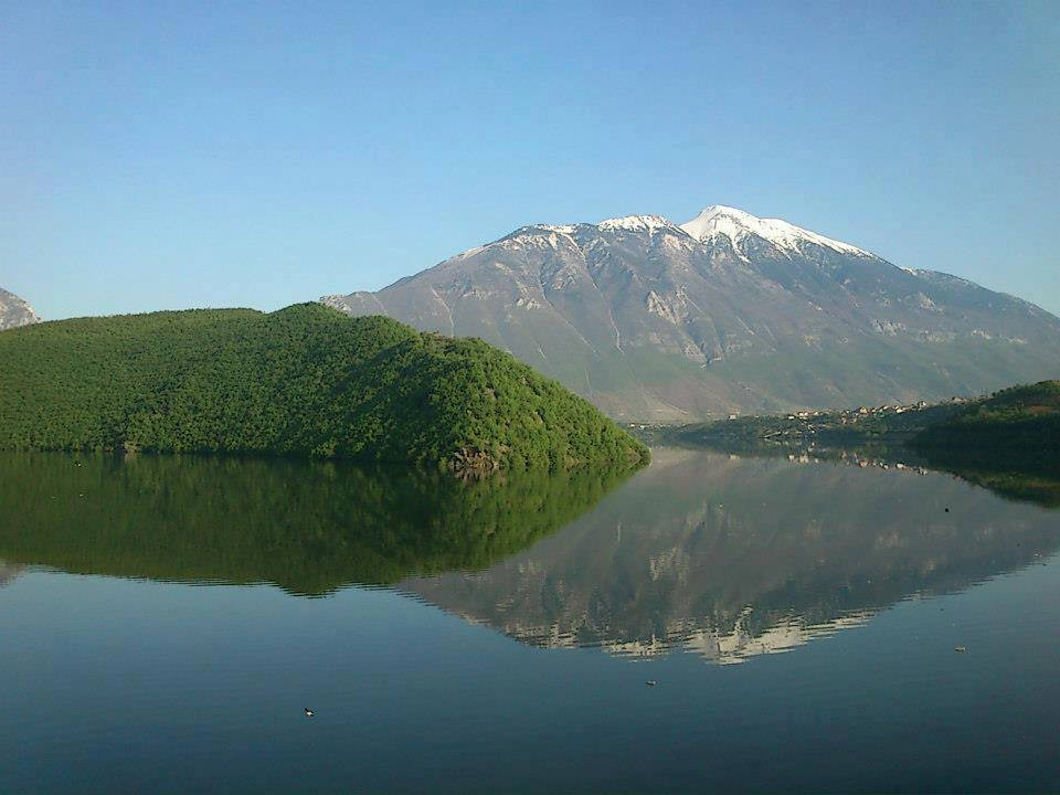 Maja e zbardhme me bore. Liqeni jone plot me uje. Kodra e Peces e mbulueme me jeshil. Mrekulli.